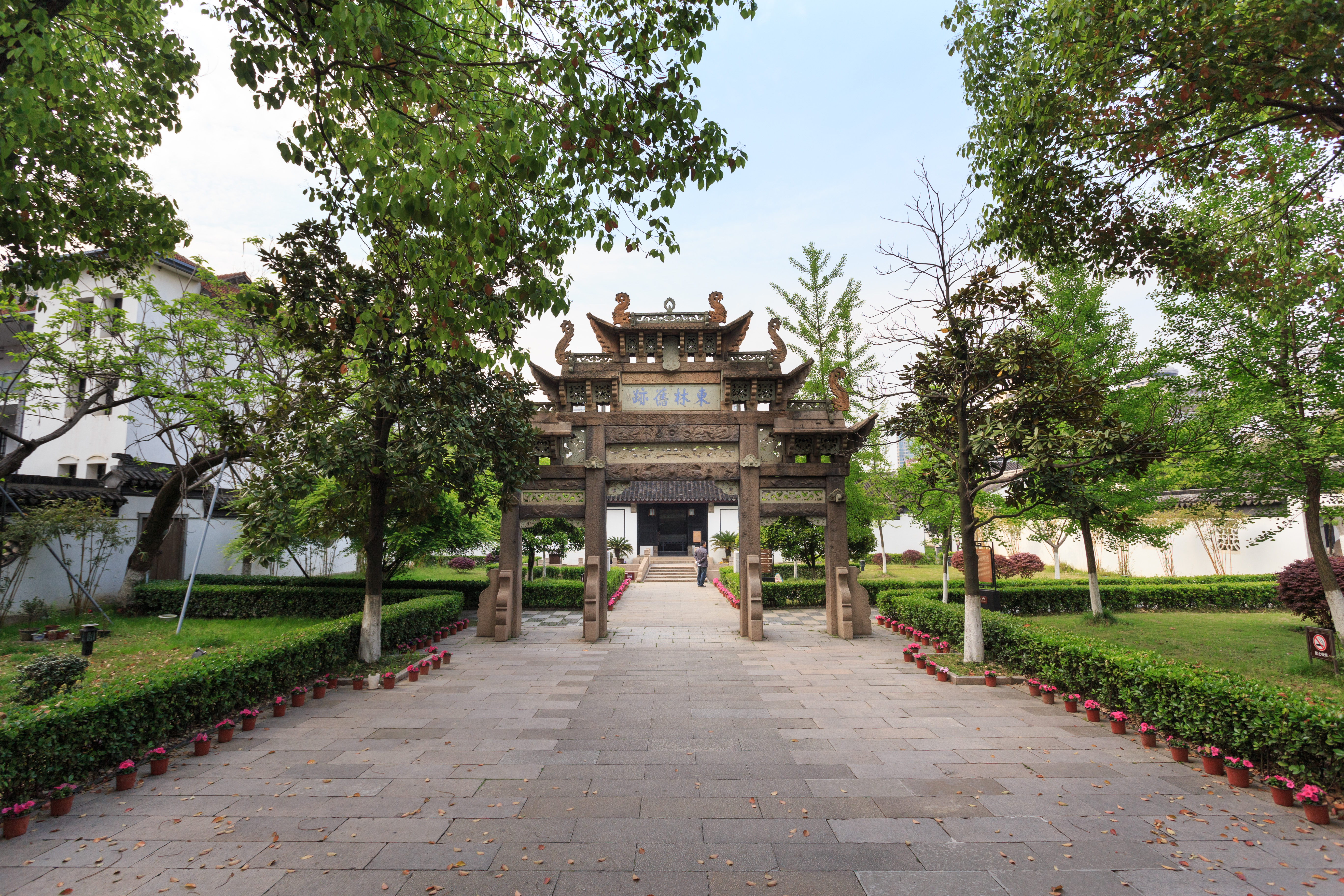 无锡东林书院 石牌坊